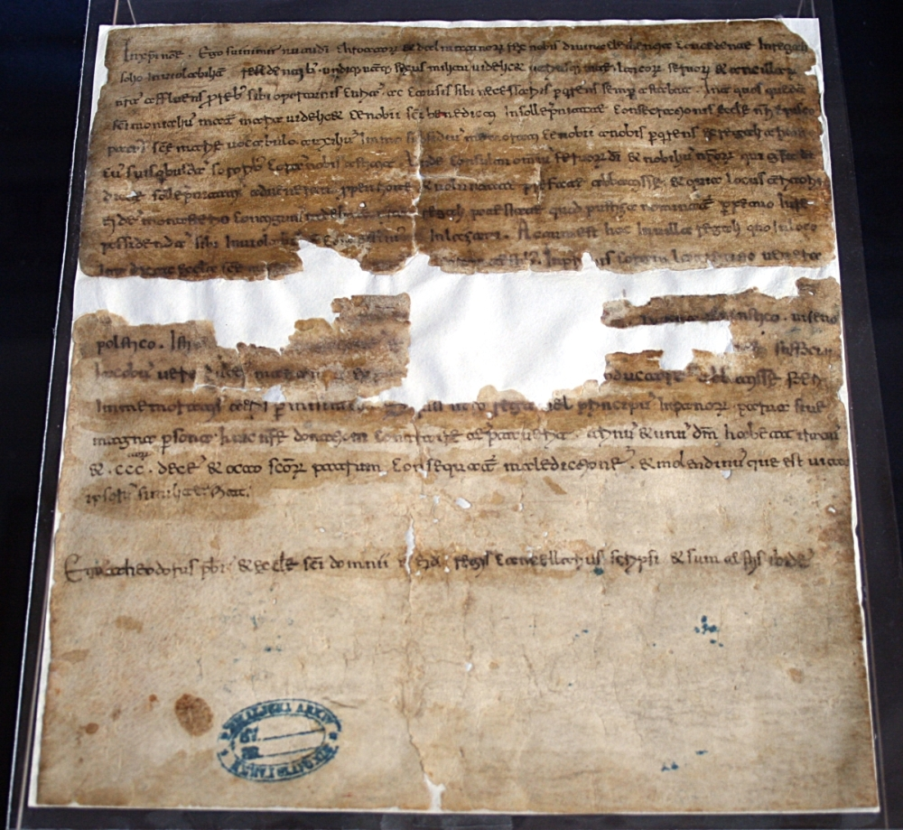 Darovnica kralja Zvonimira samostanu opatica sv. Benedikta u Splitu za zemljište Pusticu u Lažanima (1076.-78.), HR-HDA-876-10, Hrvatski državni arhiv